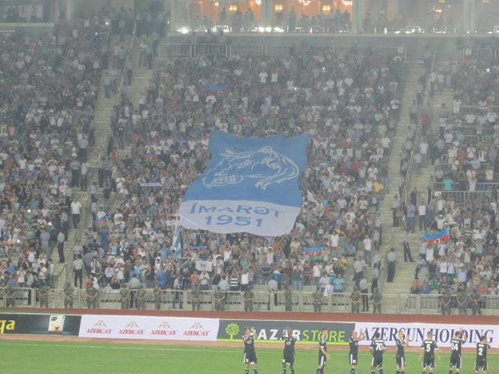 Баннер фан клуба Имарет, перед матчем раунда плей-офф лиги европы против Айнтрахтского Франкфурта - 22/08/2013 - Стадион имени Тофика Бахрамова - Баку